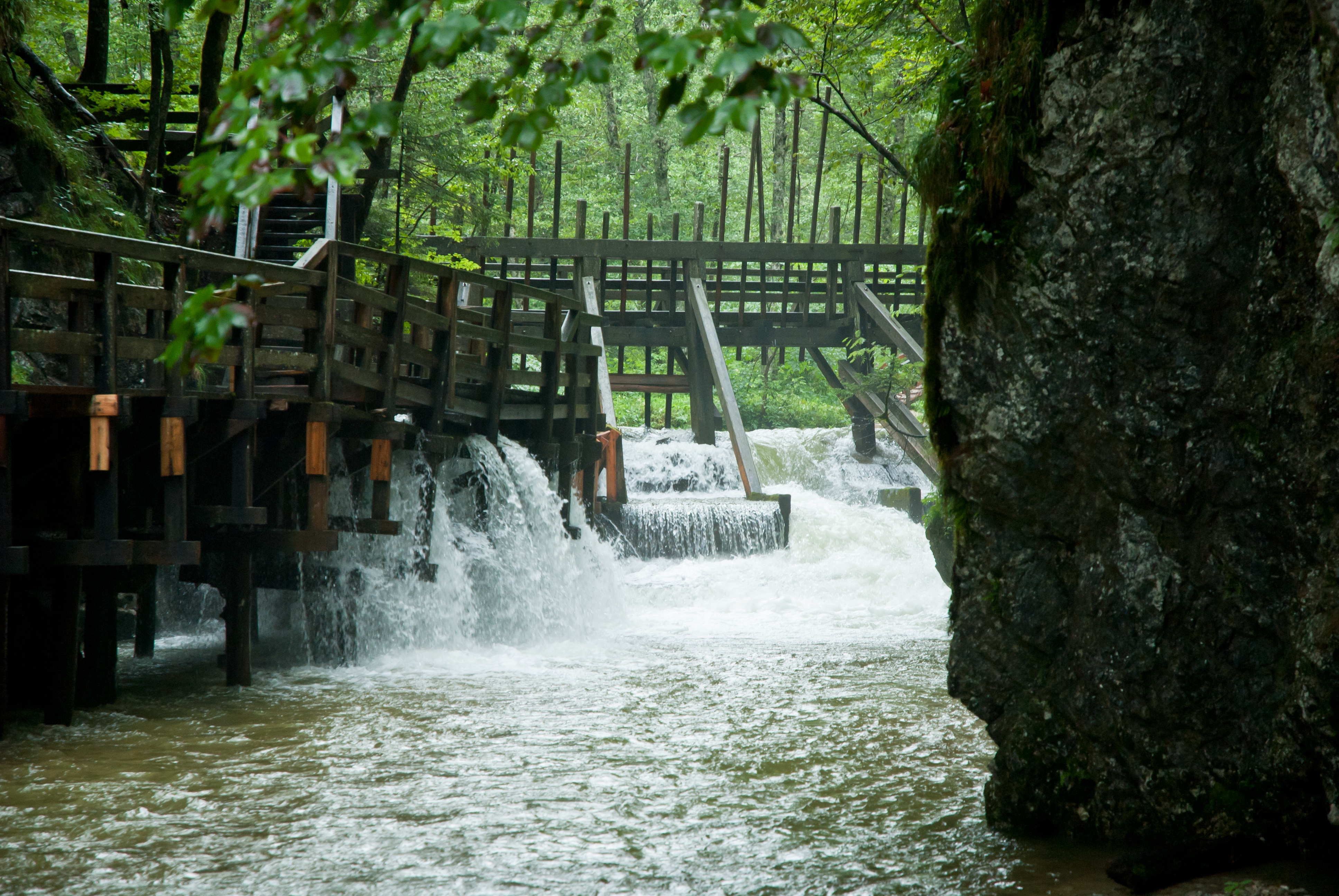 Triftrechen an der Mendling (Gemeinde Göstling an der Ybbs)